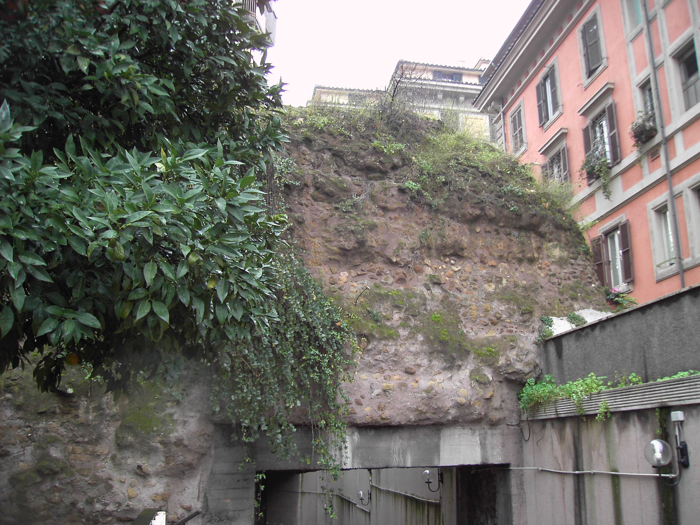 Roma, mura serviane a viale della Piramide Cestia: bastione incorporato negli edifici moderni